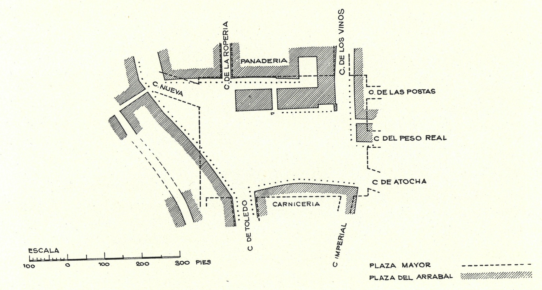 Disposición de la plaza en sus inicios